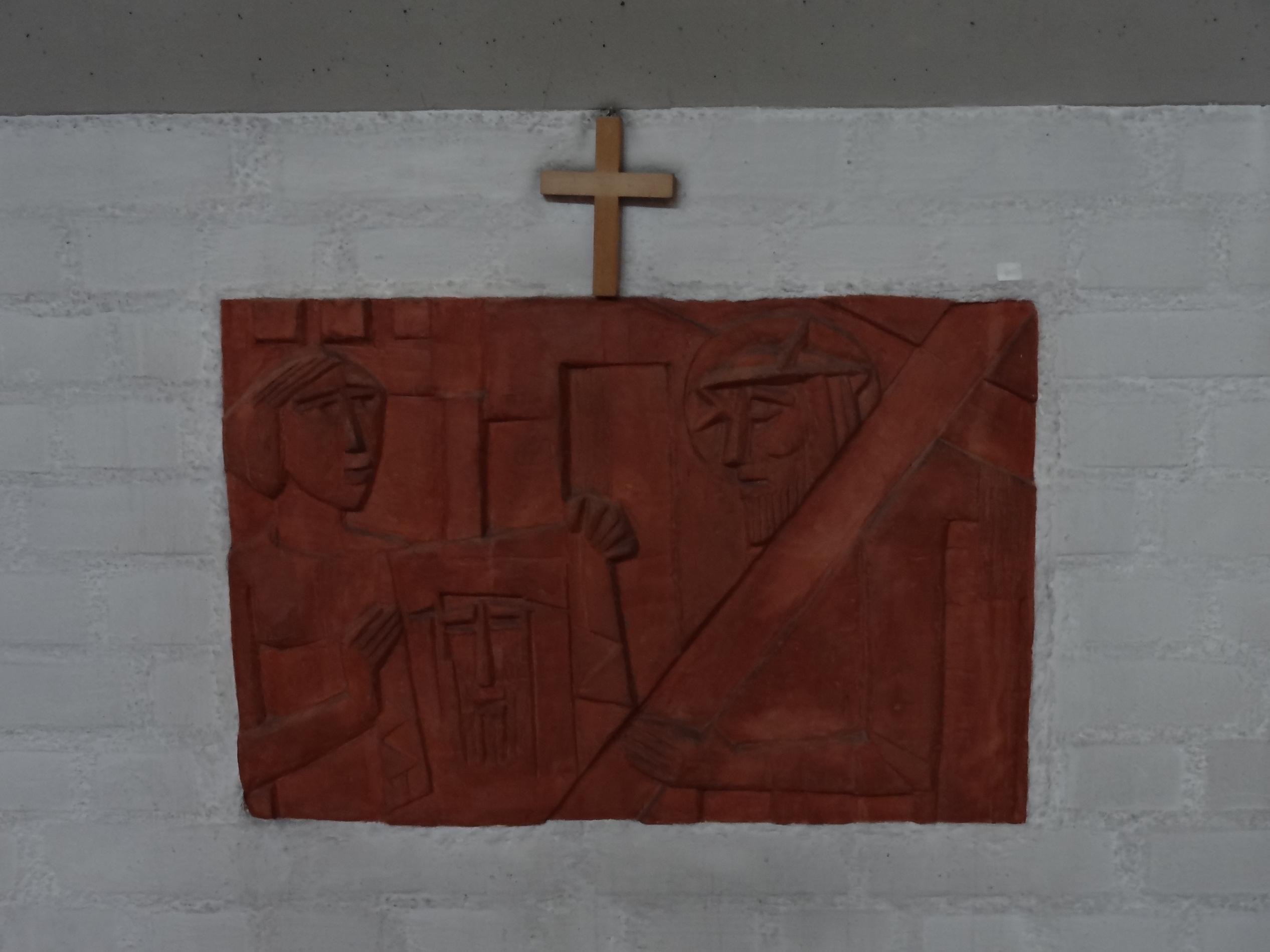 Kreuzwegtafel in der Pfarrkirche St. Pius in Landshut